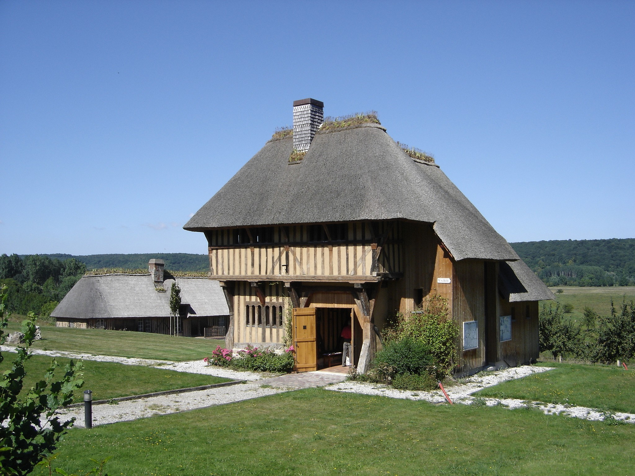 Saint-Sulpice-de-Grimbouville (Eure, Normandie, France)